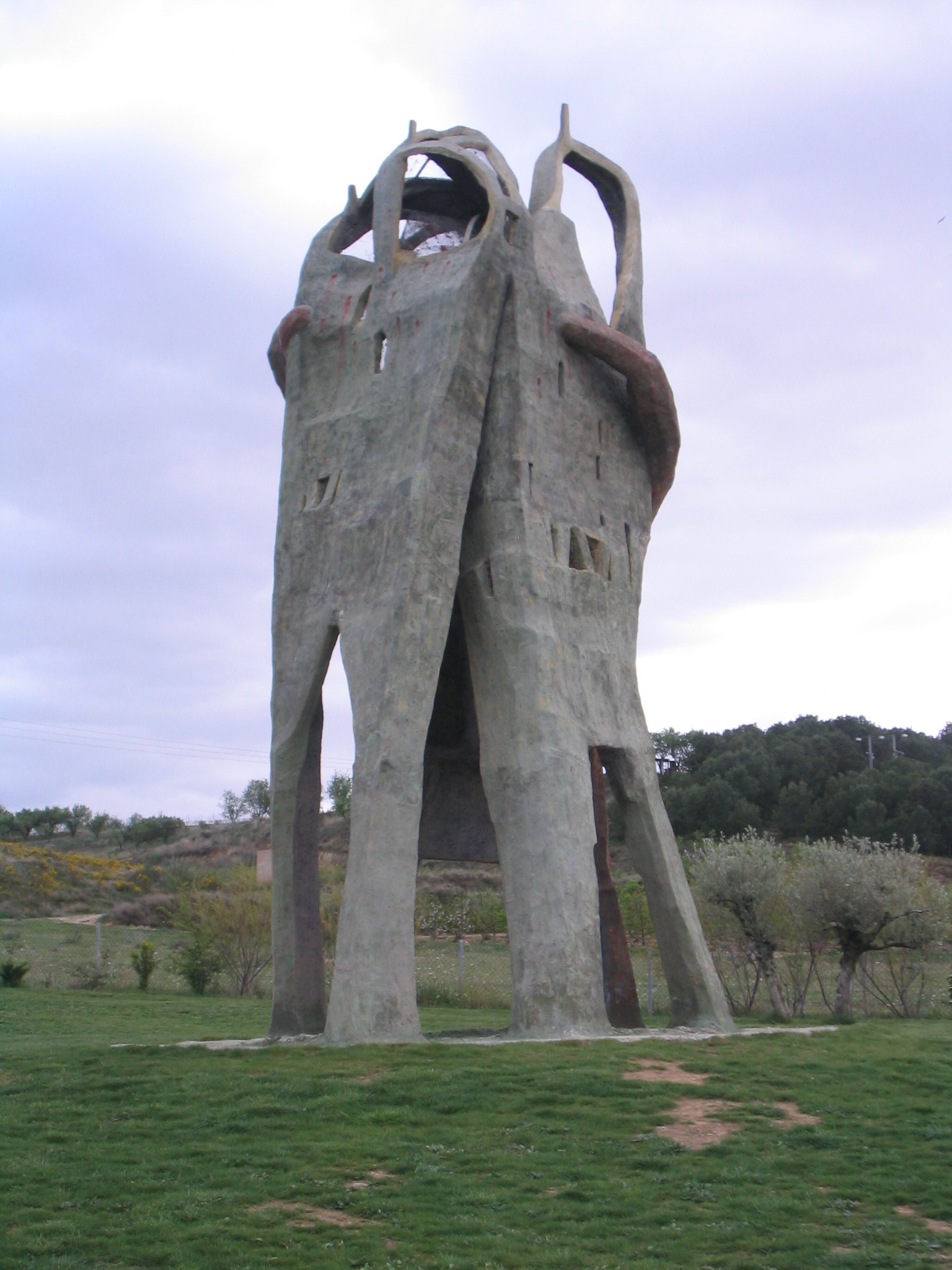 Sartaguda, Navarra (España). Parque de la memoria.